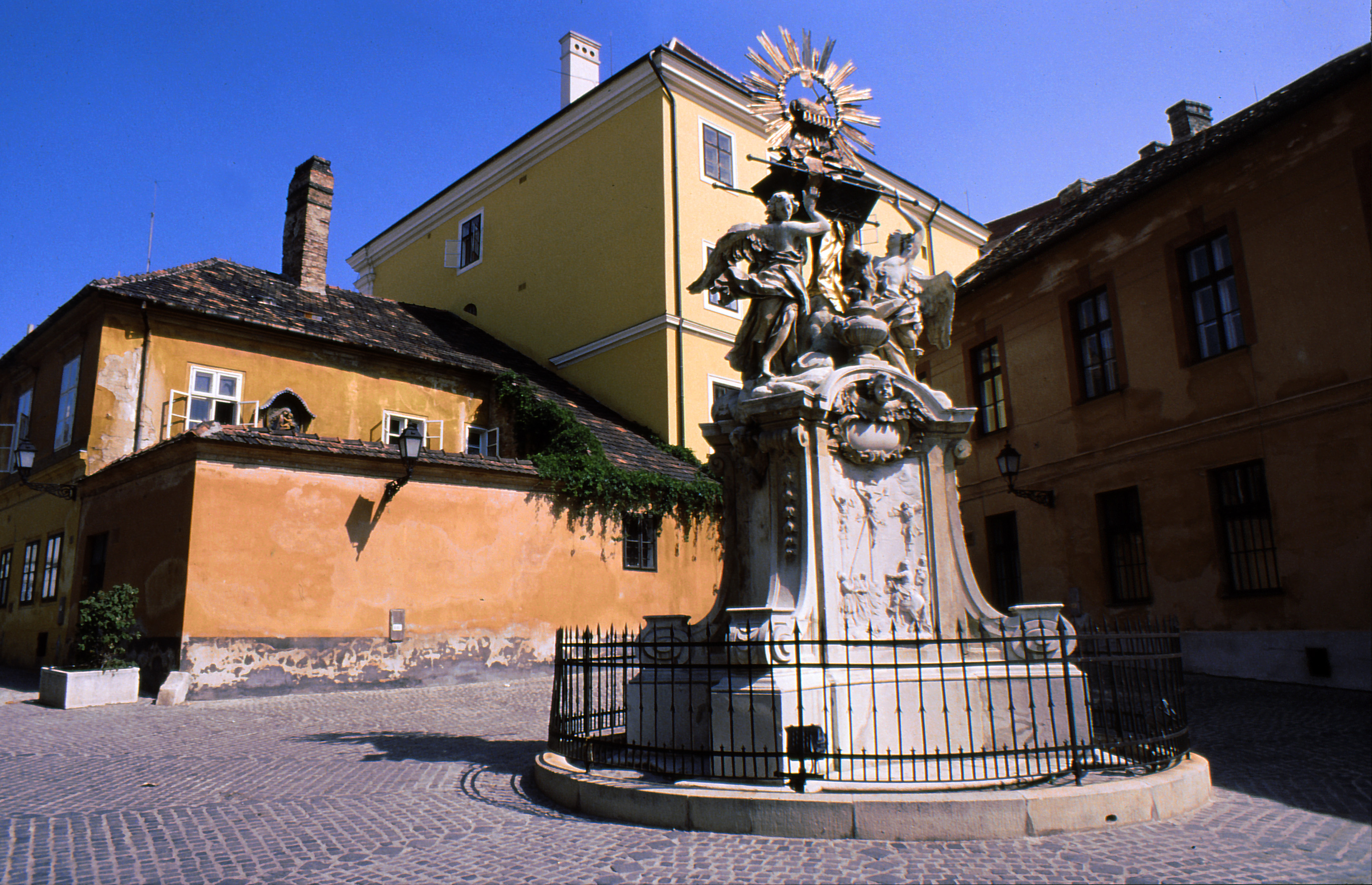 A Püspökvár bejárata a Frigyláda szoborcsoporttal (1731), Győr, Gutenberg tér